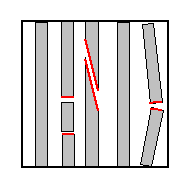 Zusammenstellung möglicher Faserbruchformen. Sie treten nicht, wie im Bild gezeigt, gleichzeitig auf.